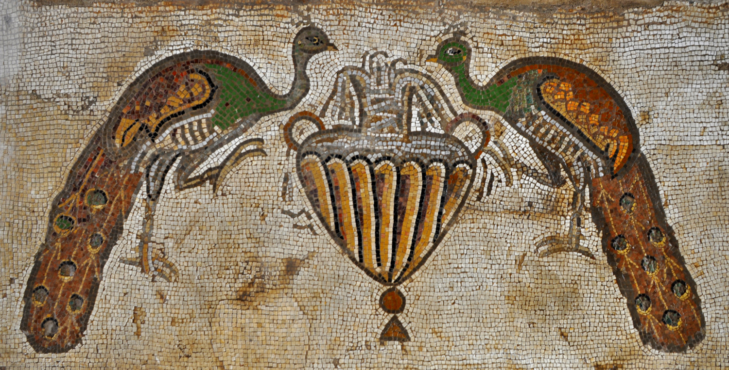 כנסייה מהתקופה הביזנטית ששרידיה נמצאו בשנת 1964 בשכונת "גבעת כצנלסון" בנהריה. שרידי הכנסייה מהמאה השישית כללו רצפת פסיפס הכוללת דמויות אדם ודמויות מעולם החי והצומח ודגמים גאומטריים. פסיפס הטווסים וביניהם אמפורה